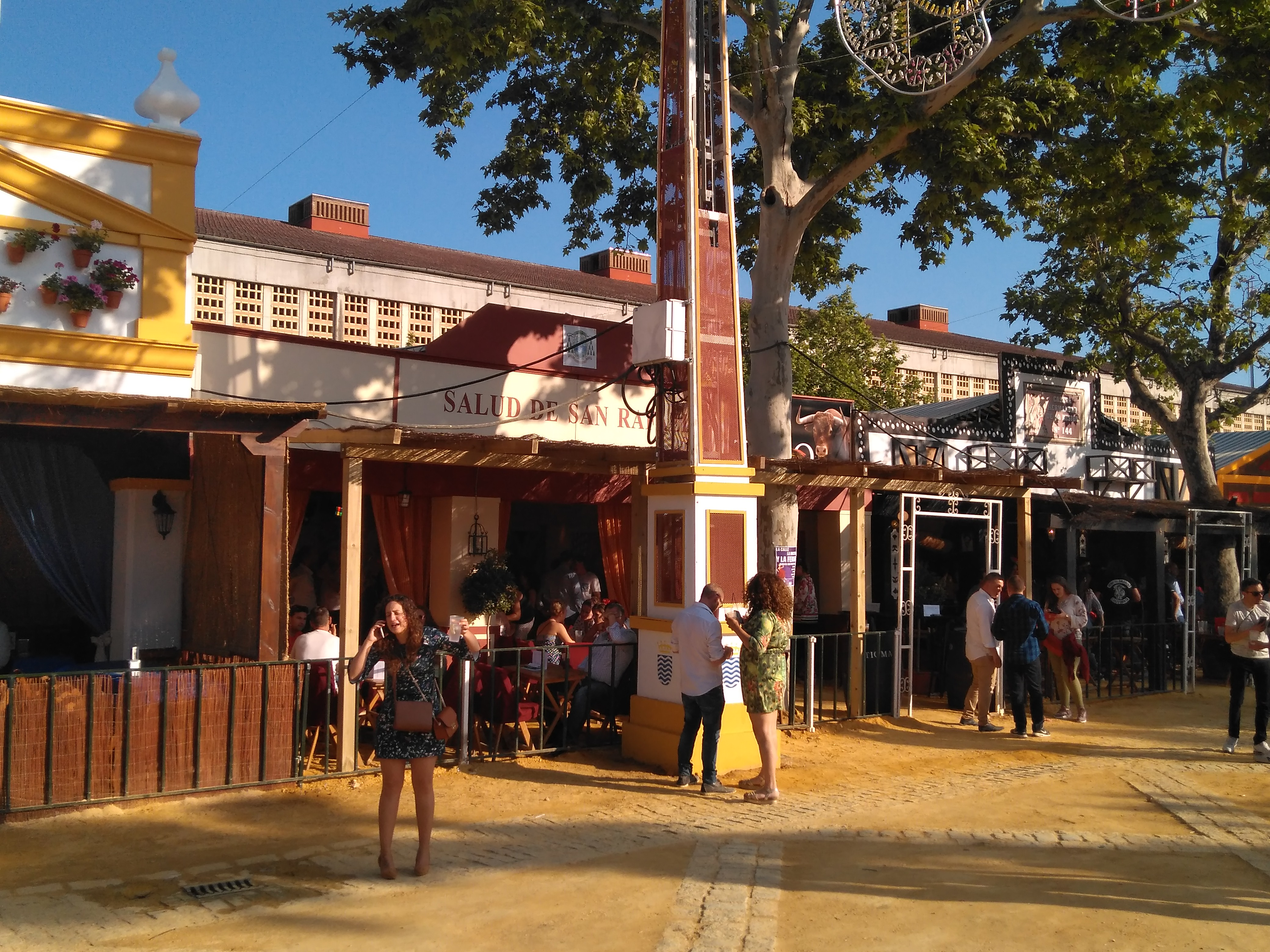 Caseta de la Hermandad de La Salud. Feria del Caballo de Jerez de la Frontera 2018 (Andalucía, España)